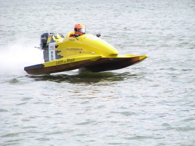 Ein Speedboot in Katamaranform.